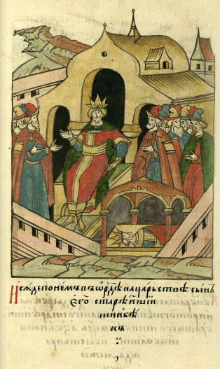 ЛИЦЕВОЙ ЛЕТОПИСНЫЙ СВОД И сел после него в Орде на царство сын его старший — Тинбек.